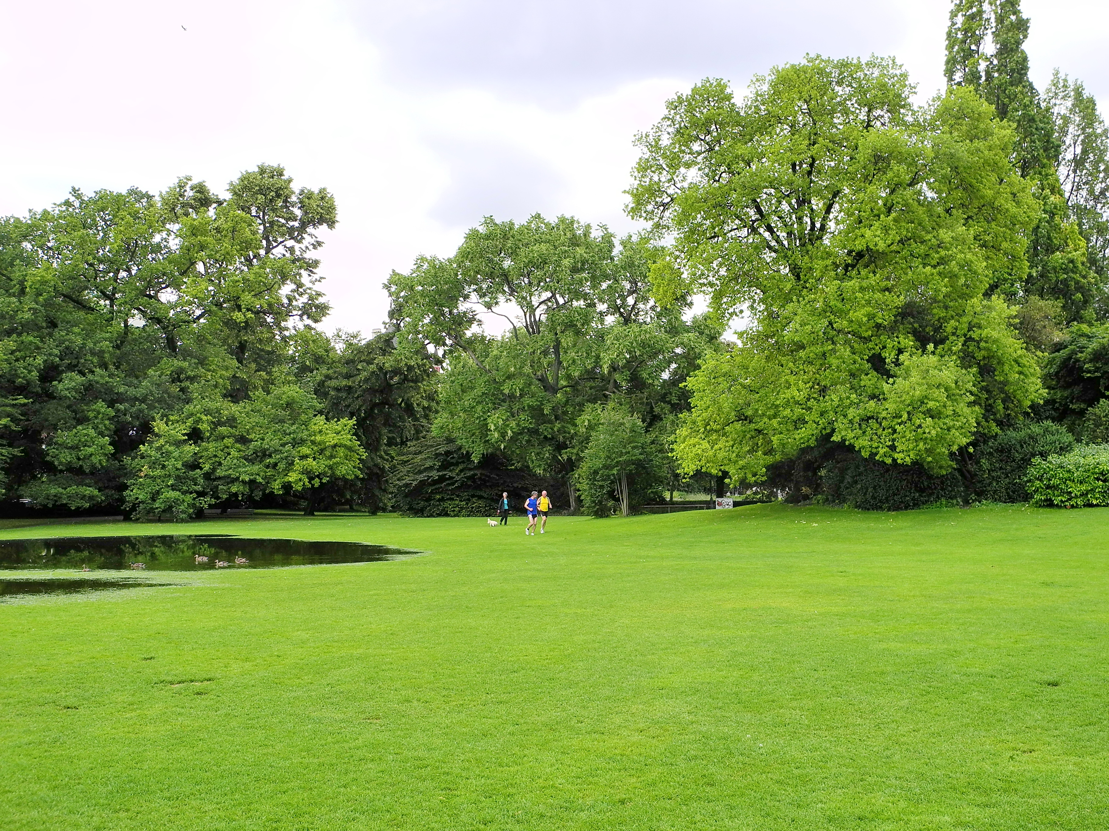 Arboretum in Zürich-Enge (Switzerland)